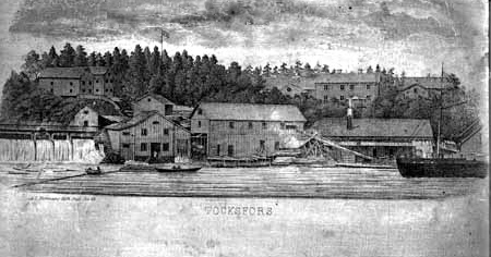 Töcksfors såg och kraftverk vid Foxen på 1870-talet.